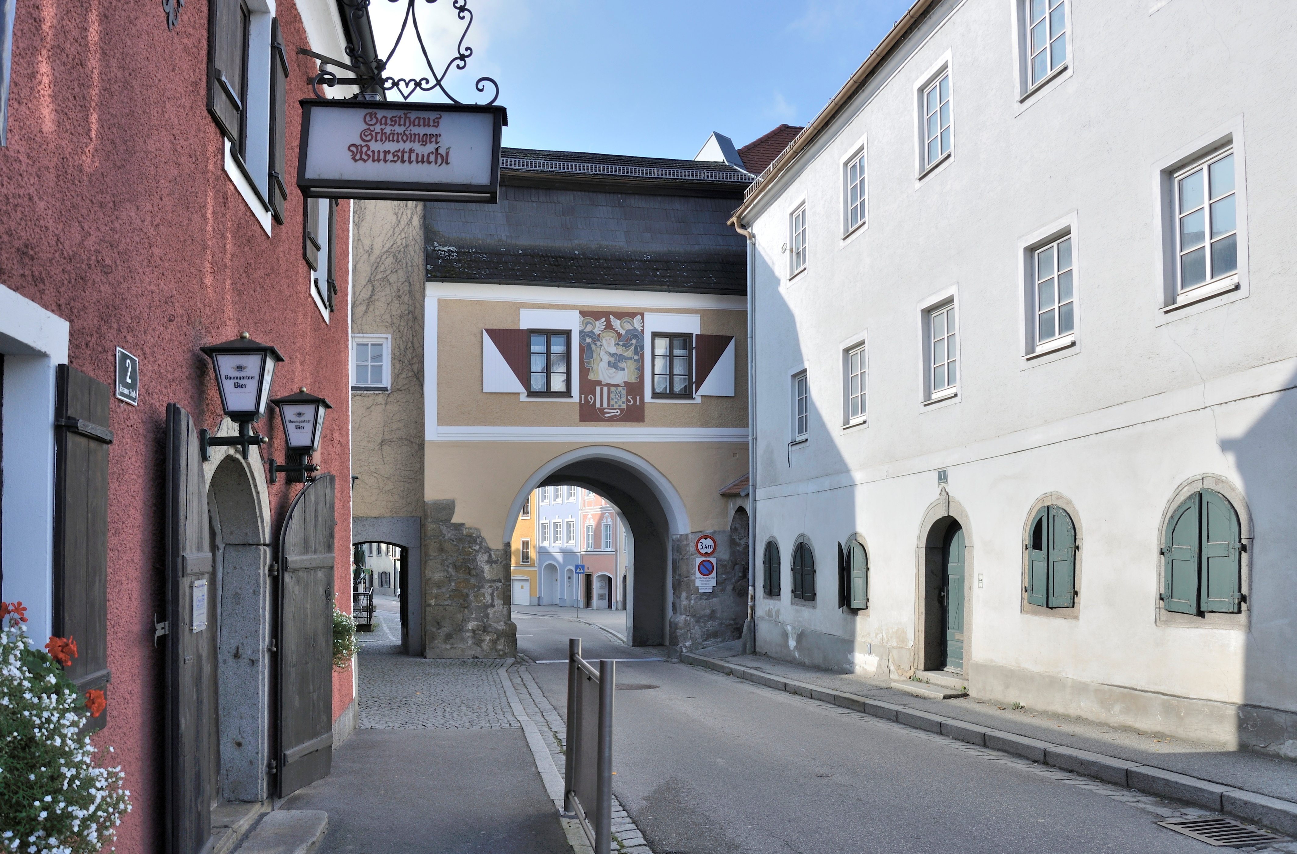 Stadttor, Passauertor ehem. Allerheiligen Tor